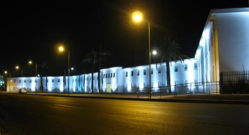 Municipalidad de la ciudad de Puente Alto. Chile